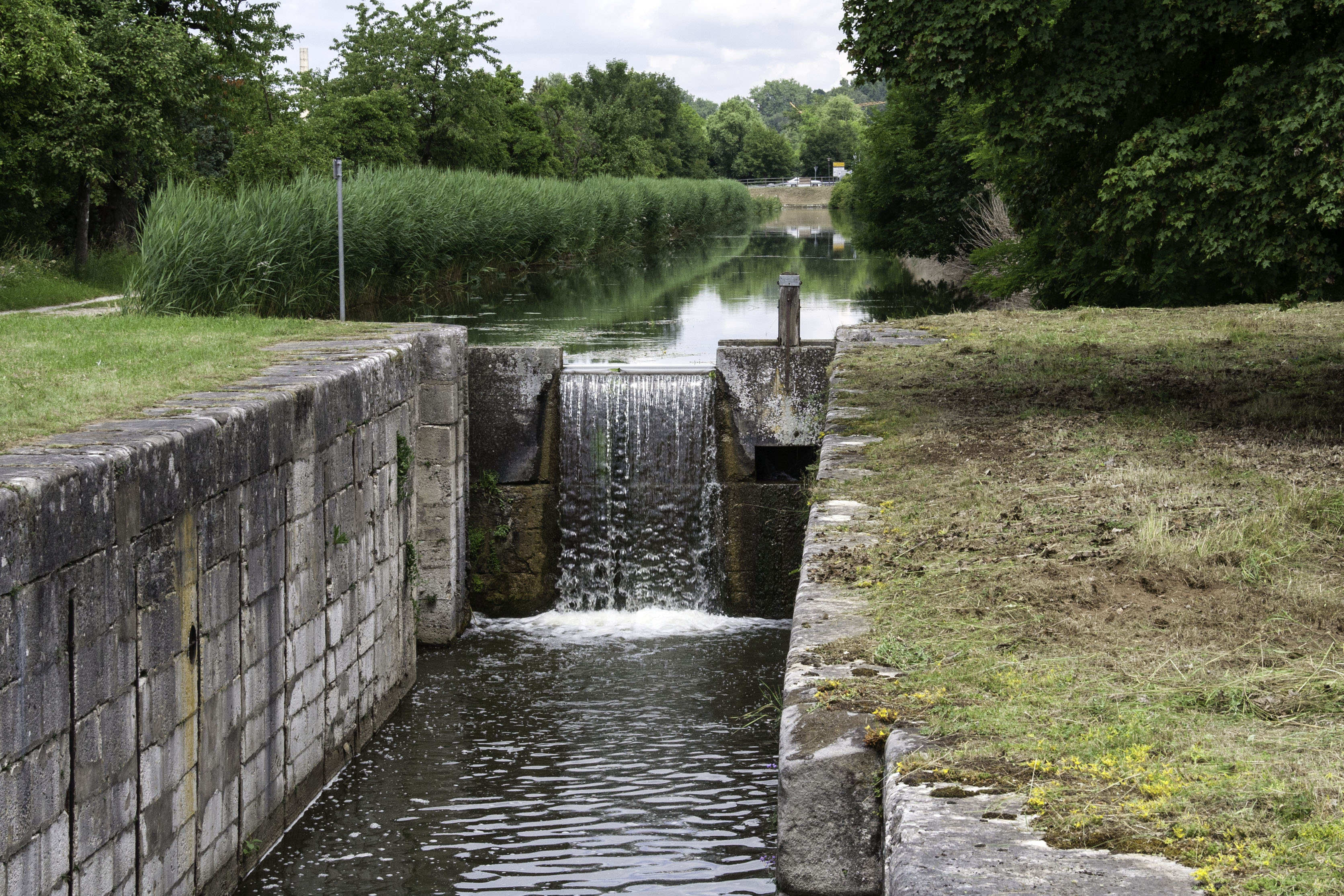 Schleuse 23, Ludwig-Donau-Main-Kanal